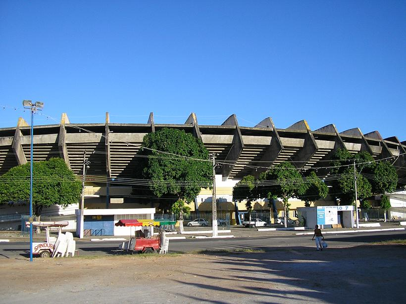 Estádio João Machado (Machadão), in Natal, Brasil.